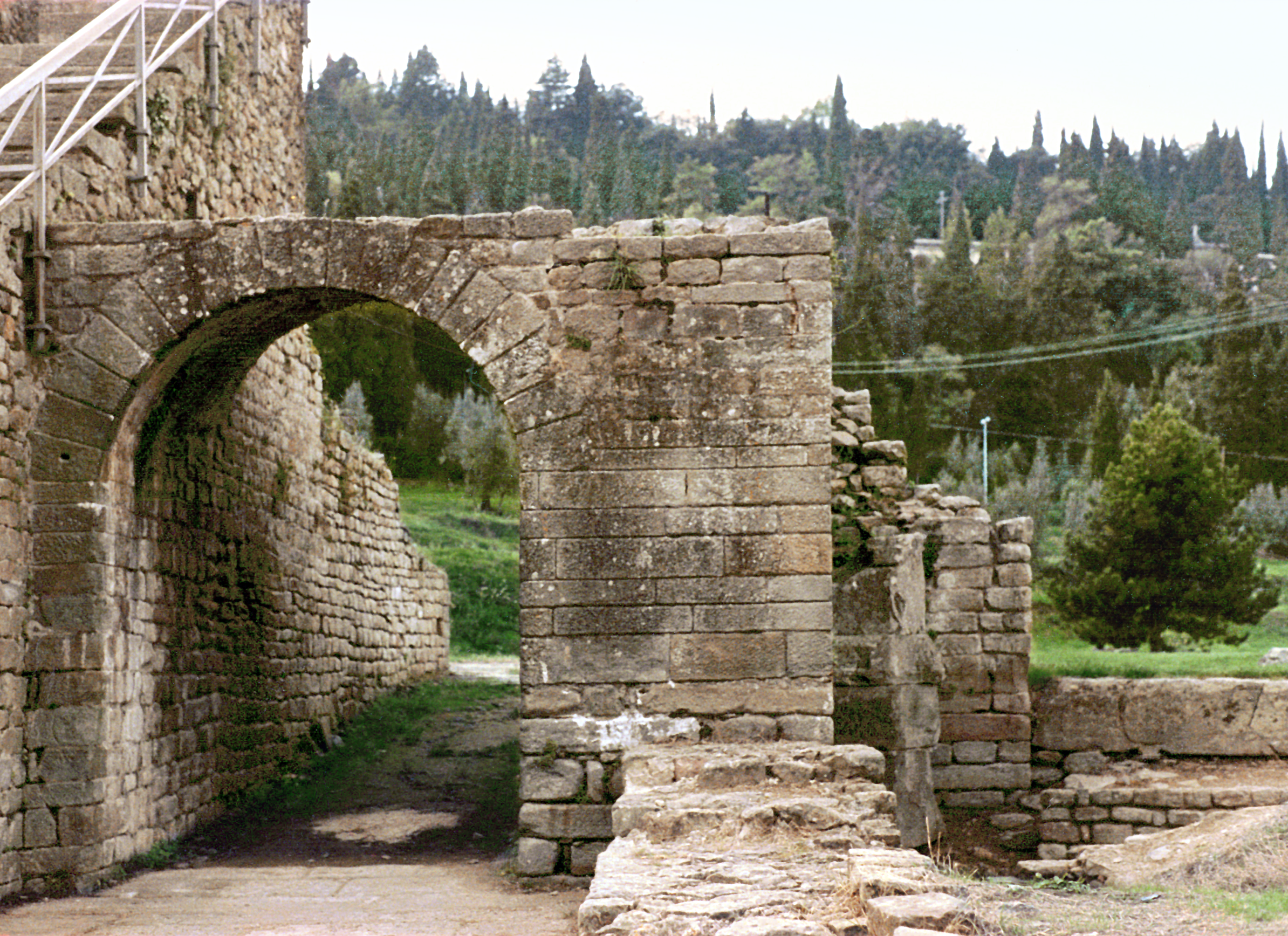 Fiesole (Toskana, Italien) - Archäologische Zone - Theater.